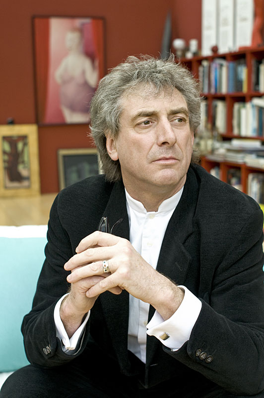 François Valentiny, architect from Luxembourg